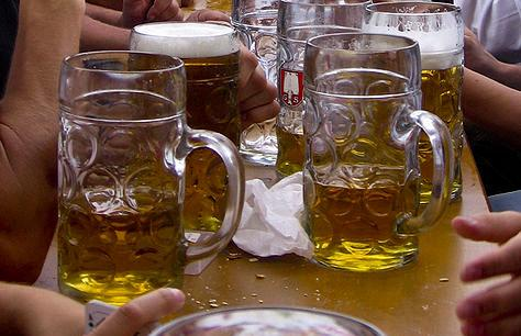 Deux mass